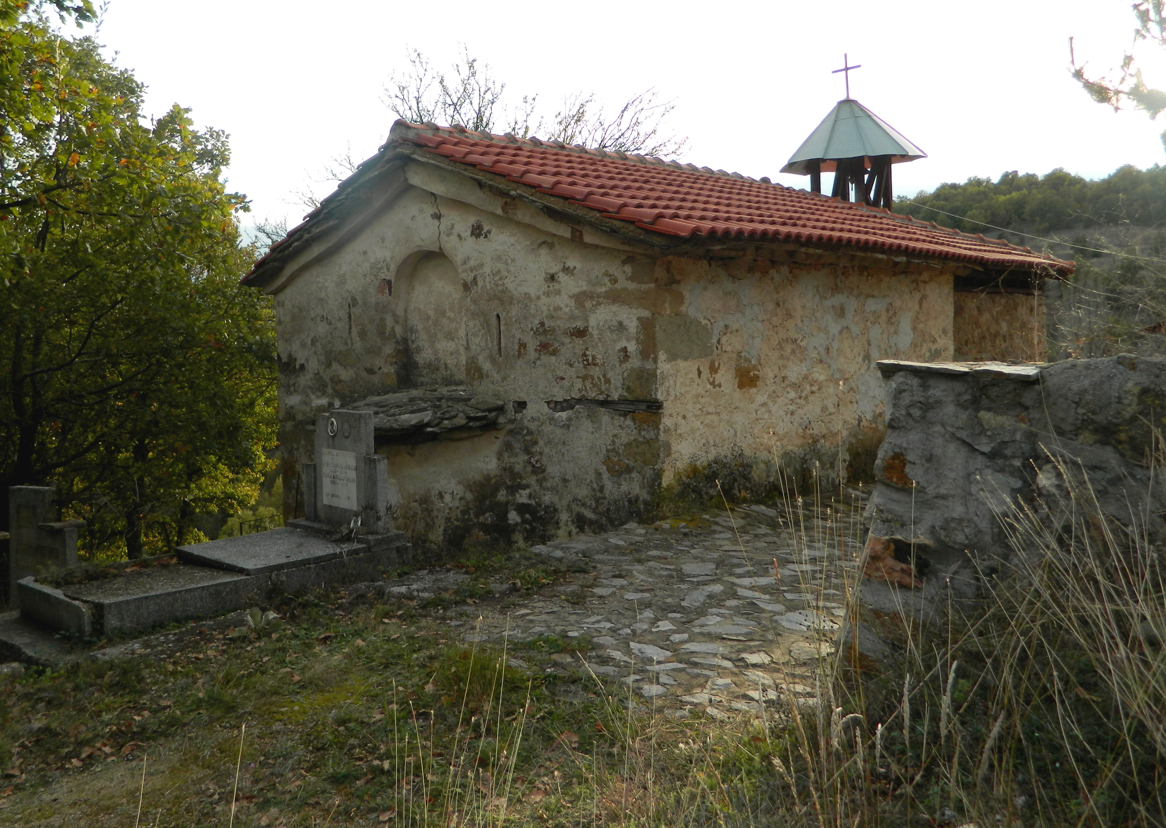 црква Свети Архангел Михаил село.Драмче,Делчево